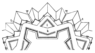 Vauban, erste Manier.